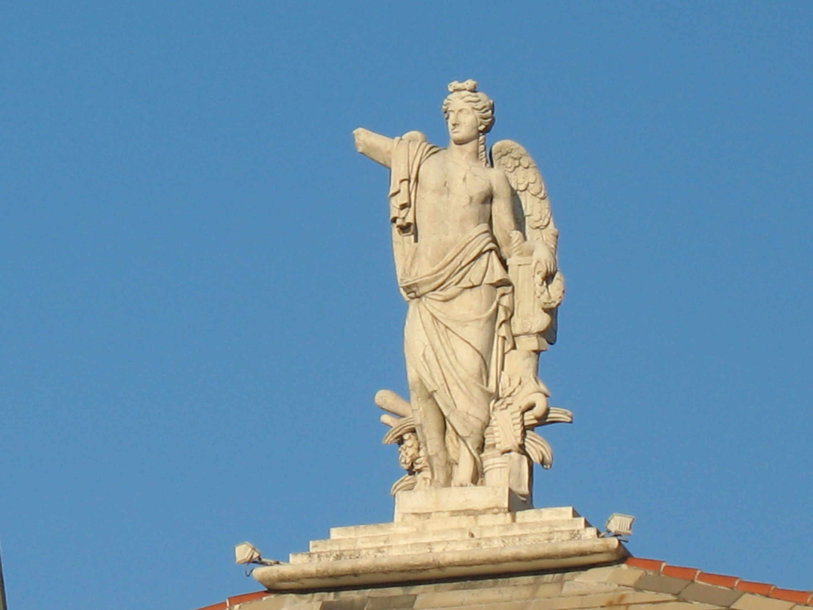 Genova - Statua neoclassica del "Genio dell'Armonia", di Giuseppe Gaggini, sovrastante il pronao del Teatro Carlo Felice